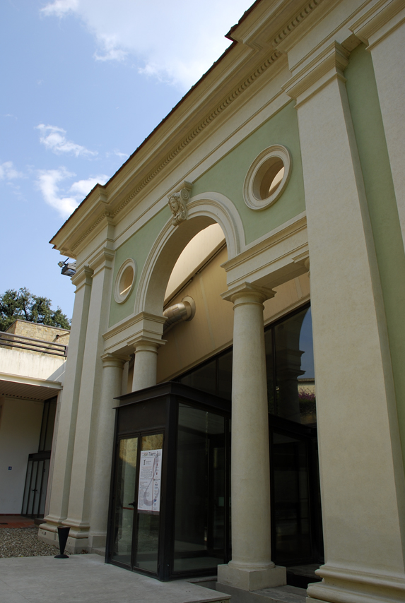 Il Boschetto or Villa Strozzi Park, Florence, Italy. Villa Strozzi Lemon-House (Wintergarten). Left Facade.